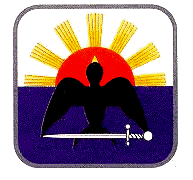 Escudo del Municipio de Cozumel, Quintana Roo